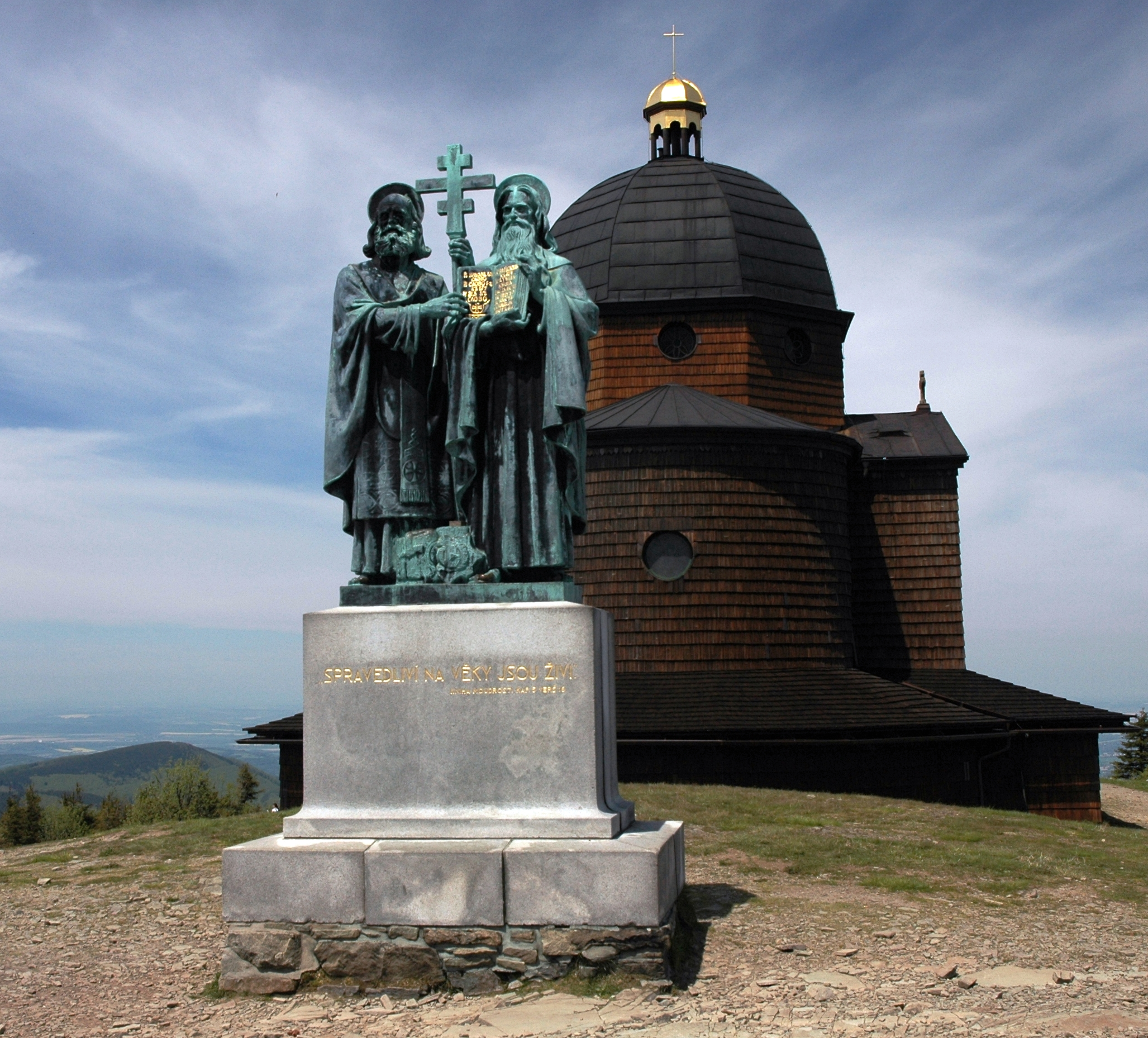 Radhošť, kaple sv. Cyrila a Metoděje